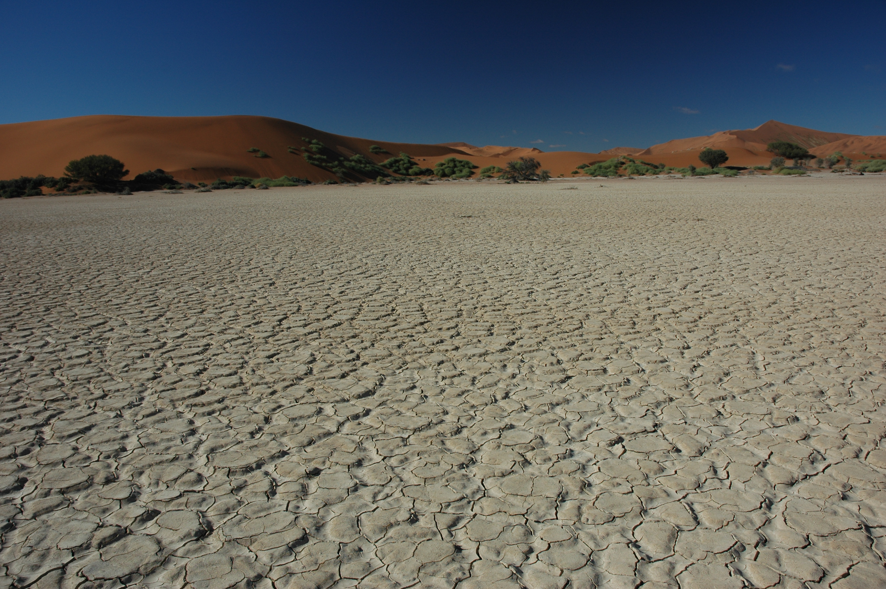 Namibie Sossusvlei Photographie prise par GIRAUD Patrick